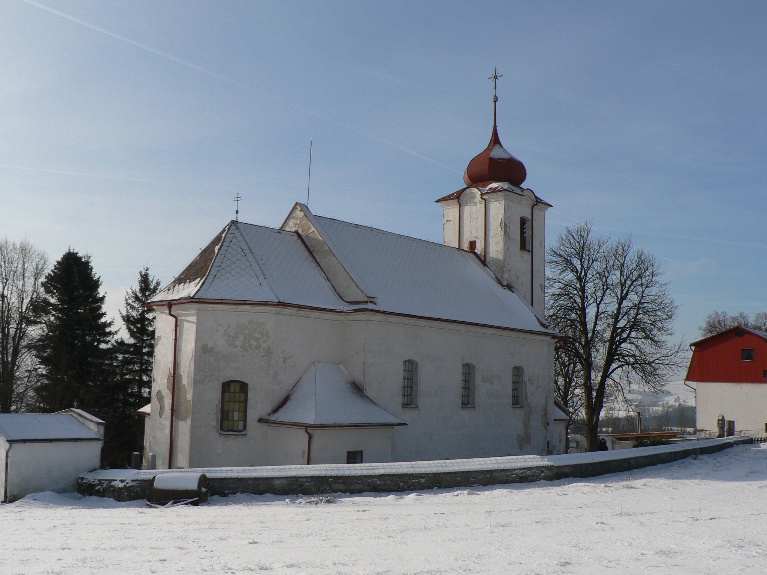 Kostel Narození Panny Marie (Vojtíškov)